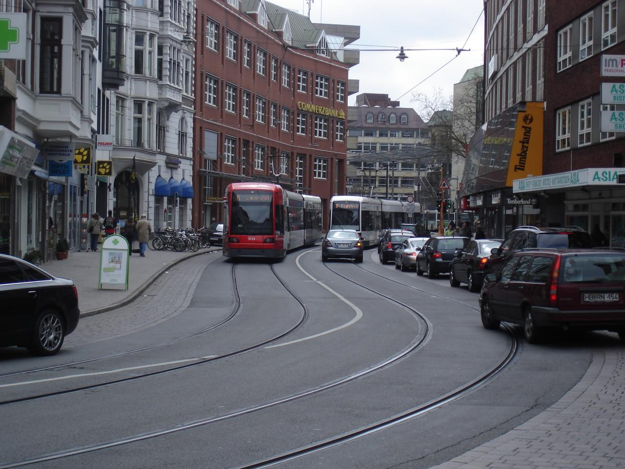 Straßenbahn Bremen